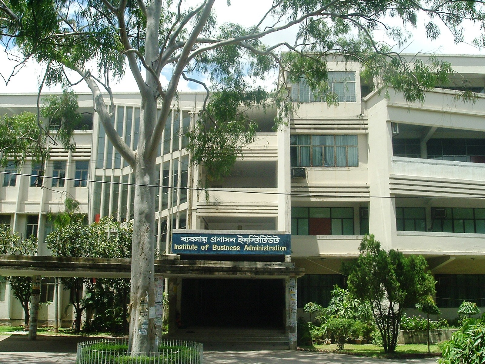 IBA, DU, Dhaka.